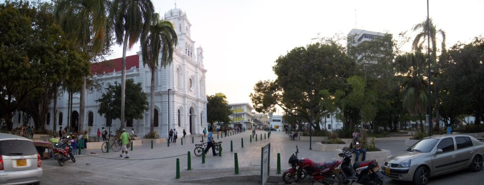 VISTA DE LA CATEDRAL SAN JERONIMO Y EL PARQUE SIMON BOLIVAR DE MONTERIA